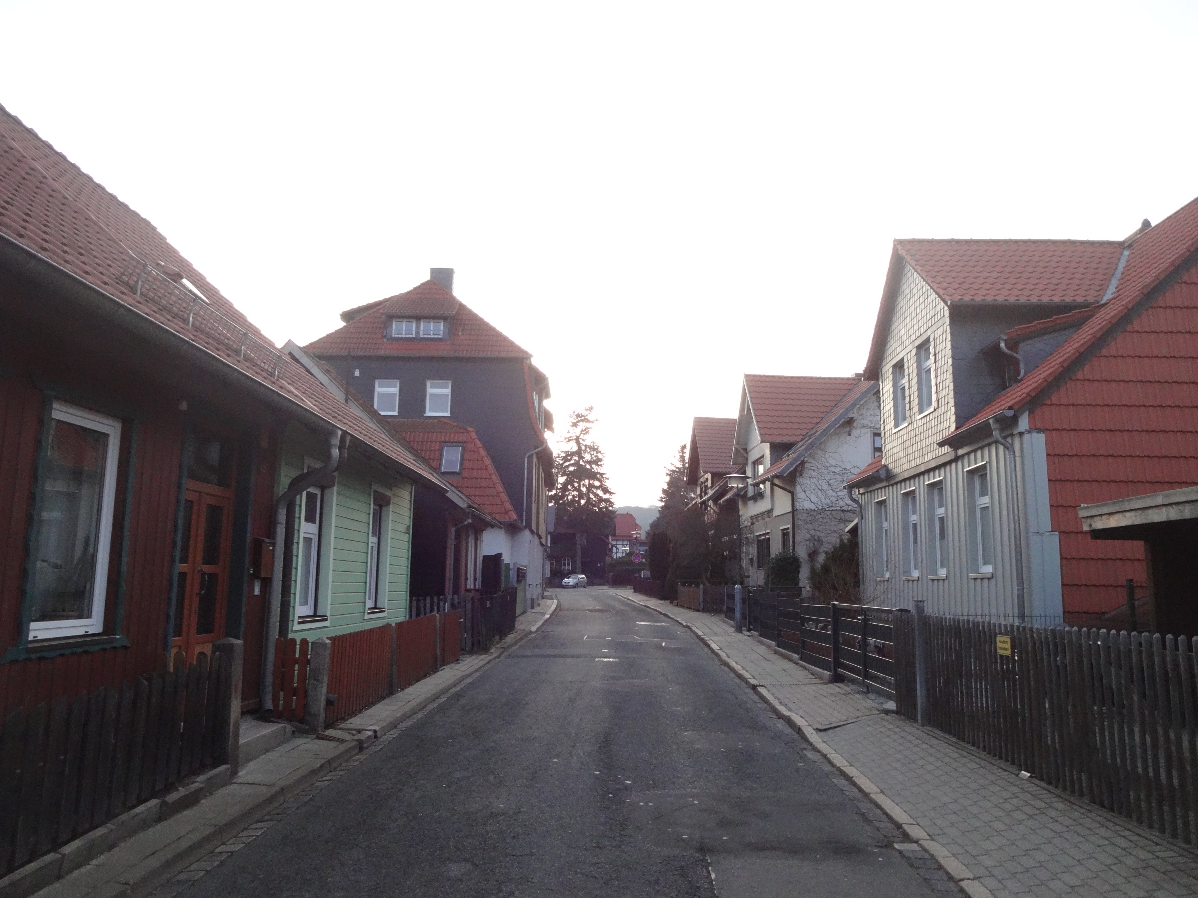 Teil einer ehemals denkmalgeschützten Häusergruppe Lüttgenfeldstraße 18, 21, 23, 24a, Pfälzergasse 1a, 1b, Unterm Ratskopf 34 in Wernigerode